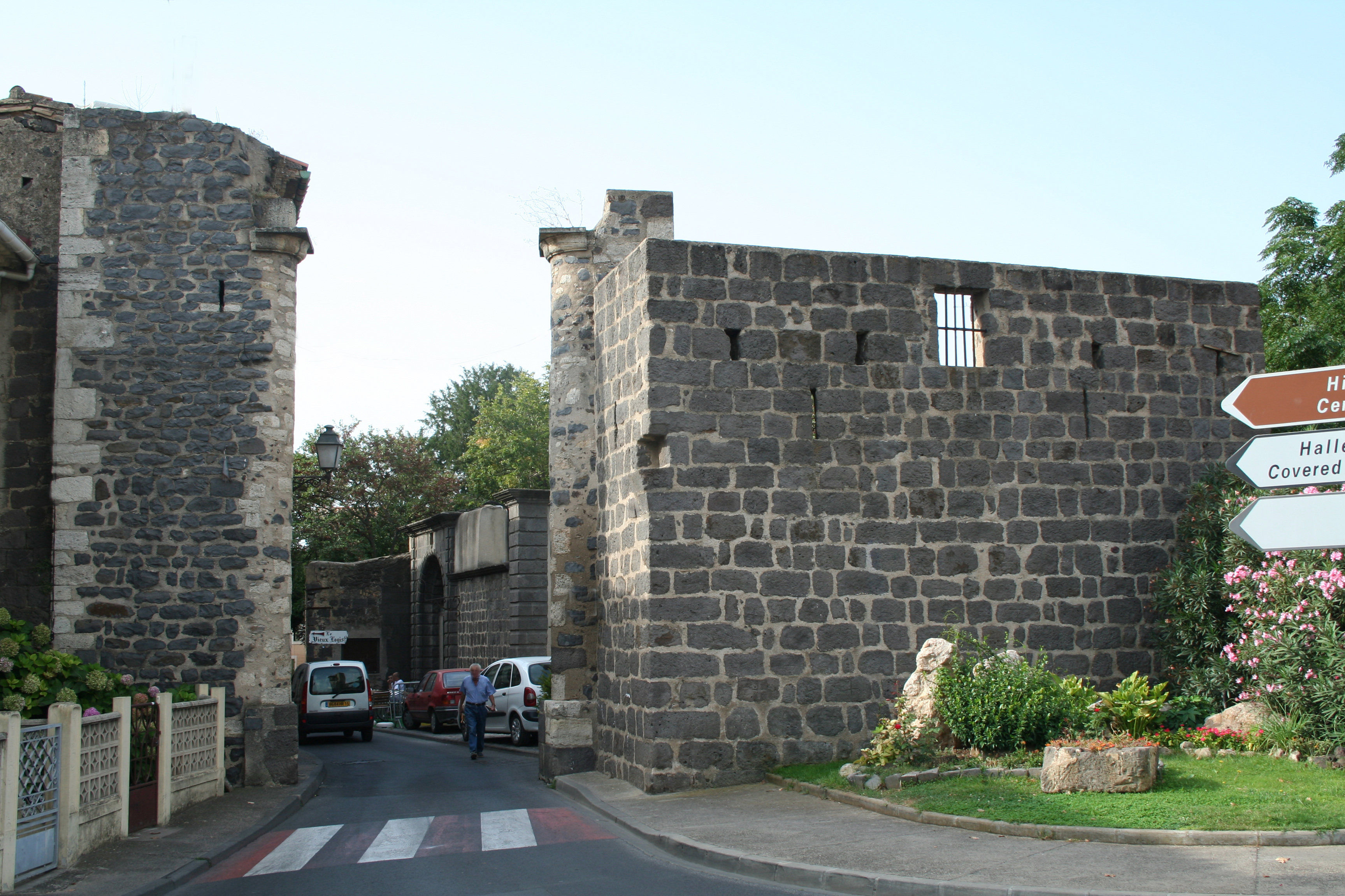 Vias (Hérault) - rempart.